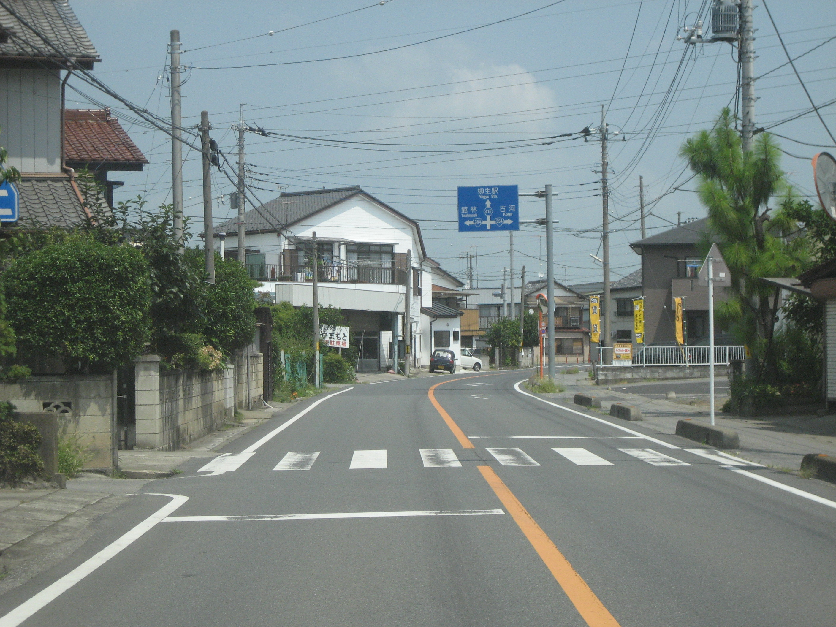 埼玉県道415号線北川辺町内